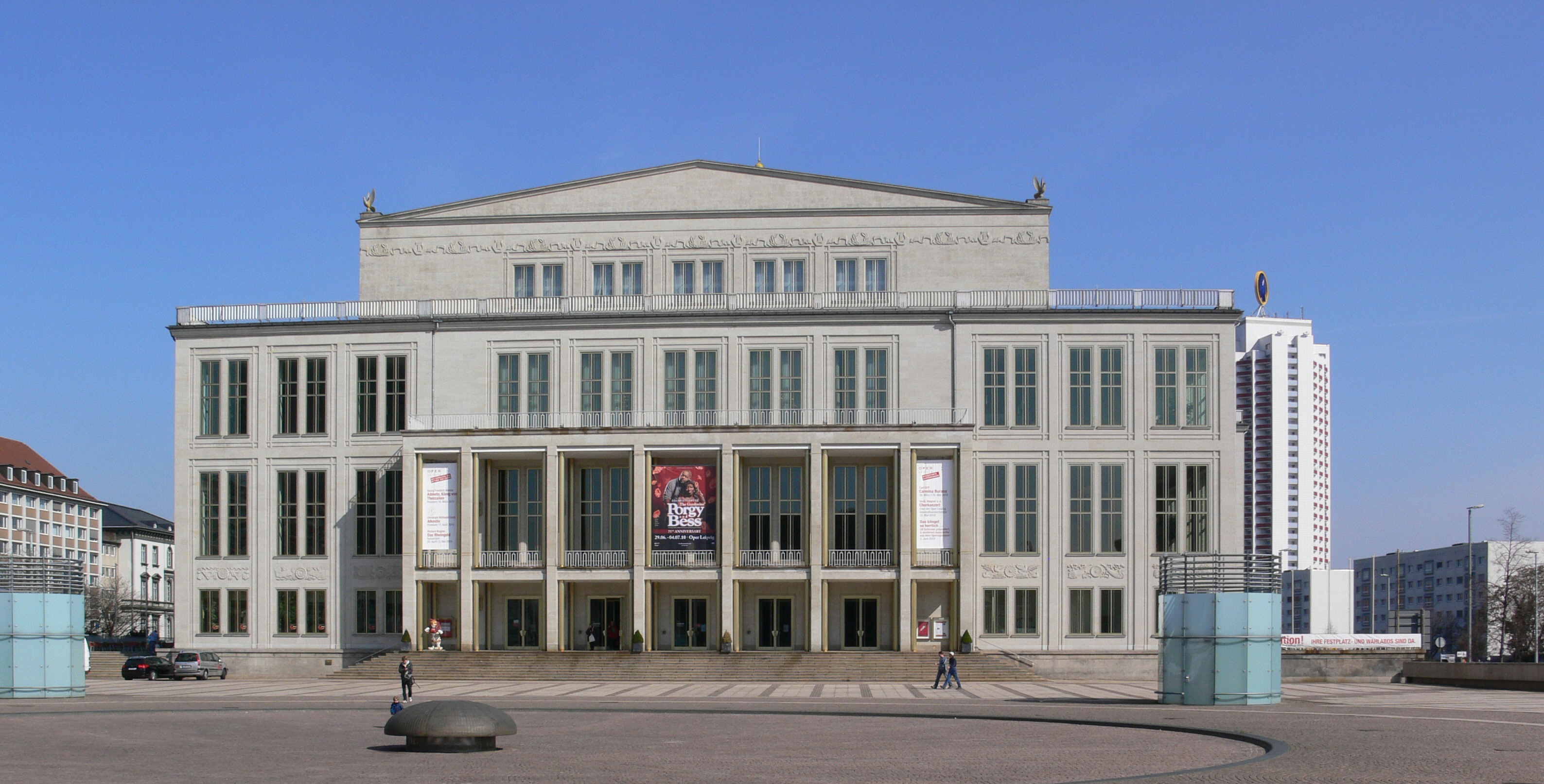 Leipzig, Opernhaus am Augustusplatz